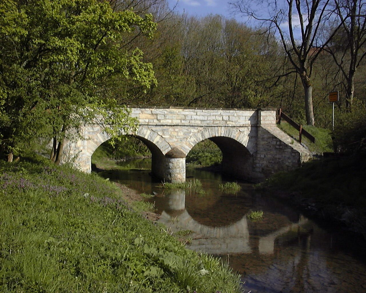 Bogenbrücke über die Sauer am Ortseingang von Grundsteinheim, Lichtenau (Westfalen)